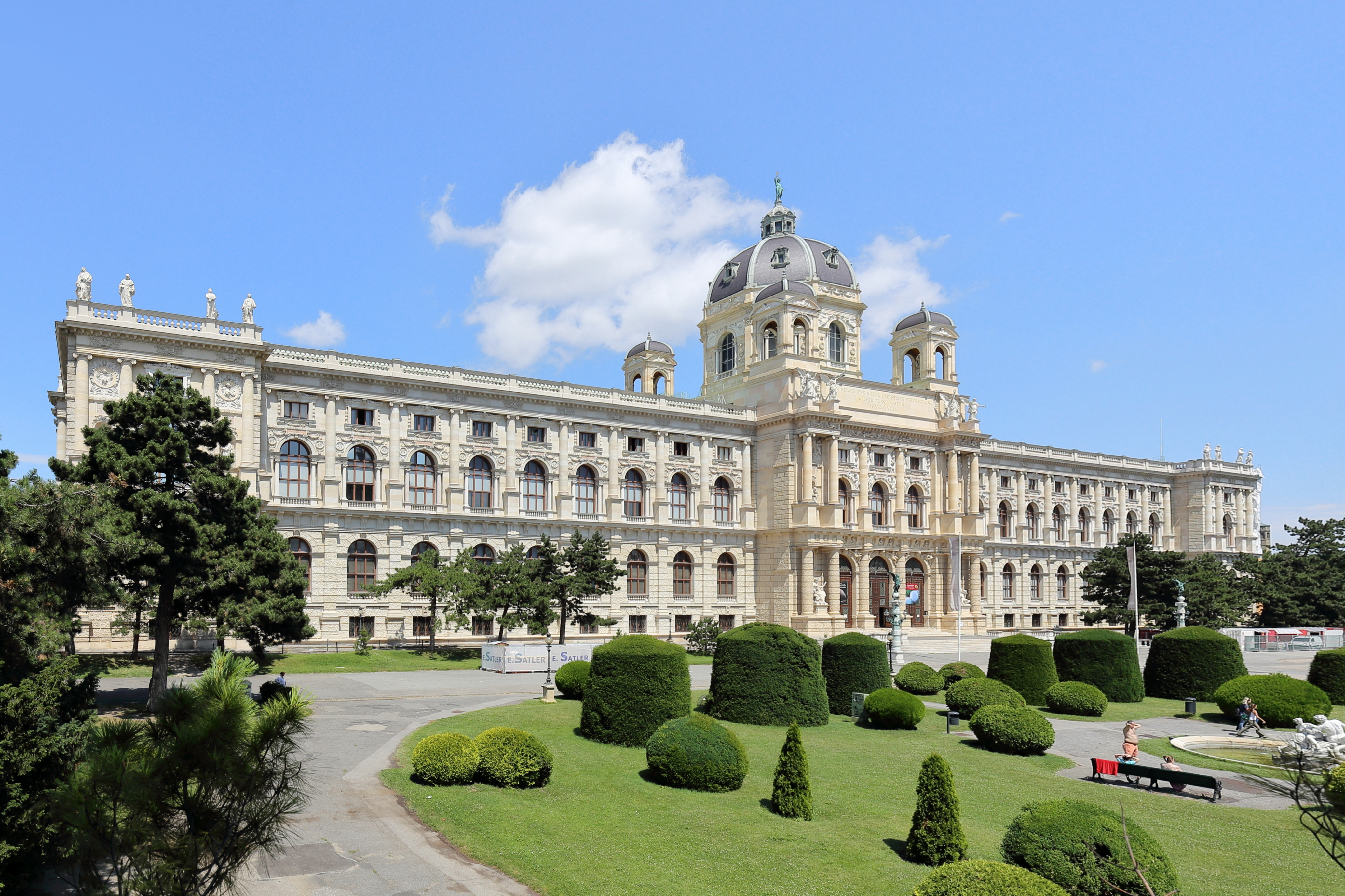 Südansicht des Naturhistorischen Museums am Burgring im 1. Wiener Gemeindebezirk Inneres Stadt.Das Bauwerk im Stil der italienischen Renaissance ist mit dem Kunsthistorischen Museum symmetrisch zueinander angeordnet und äußerlich spiegelgleich. Es wurde von 1872 bis 1881 von Gottfried Semper und Carl von Hasenauer (nachdem Semper 1876 Wien verlassen hatte, von ihm allein) im Rohbau fertiggestellt und am 10. August 1889 eröffnet. Das viergeschossige Gebäude (Tief-, Hochparterre, I. und II. Stock) mit zwei Innenhöfen ist 170 m lang, im Mittelteil 70 m breit und außen mit rund 250 Bildwerken geschmückt.